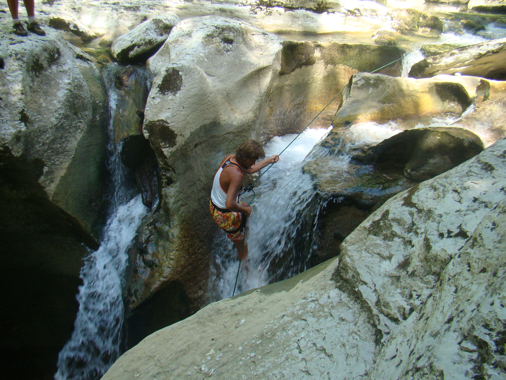 Каньонинг. Хостинский известковый каньон, Сочи This image is related to the protected area of Russia number 2310441